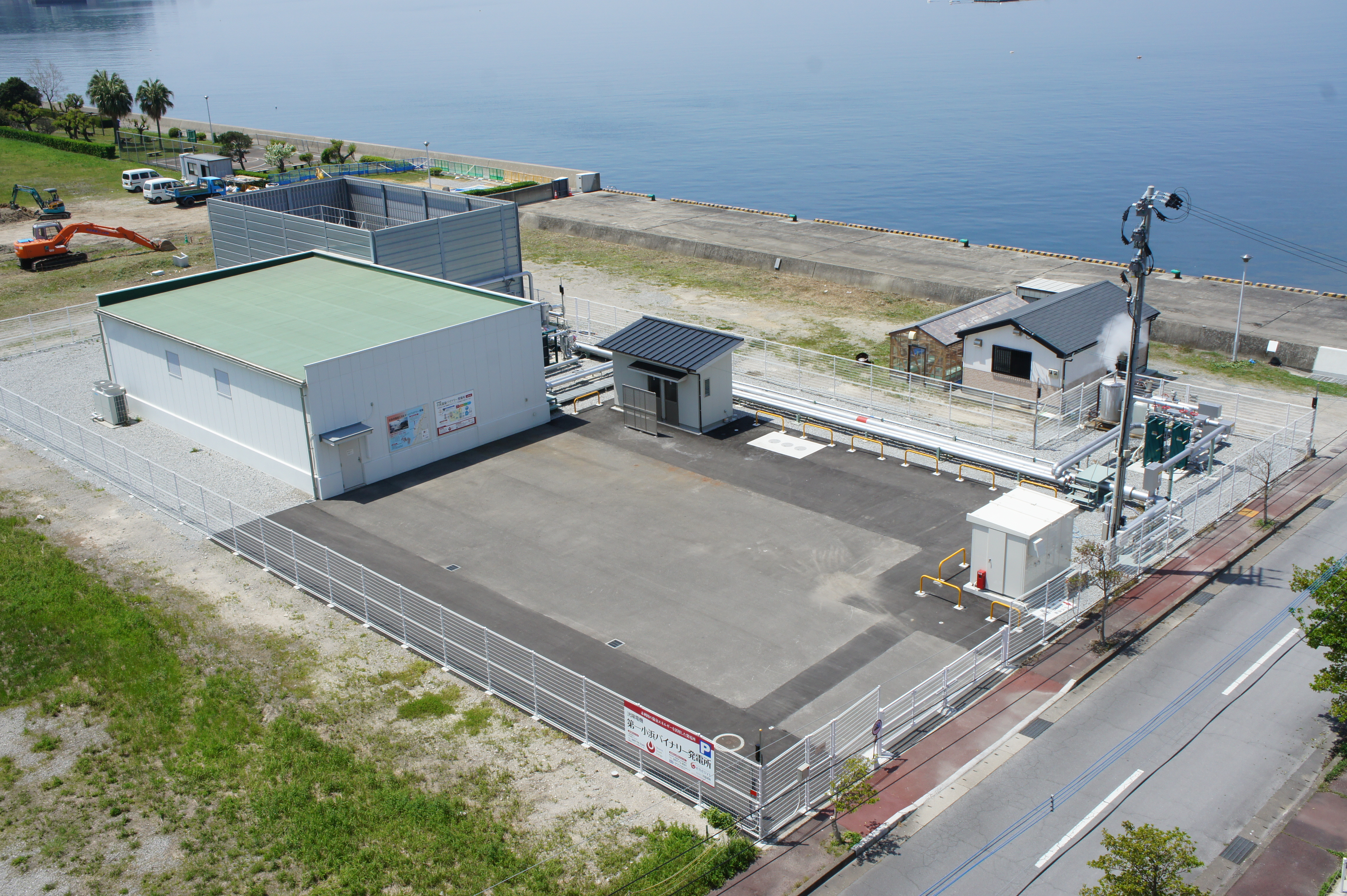 小浜温泉にある、温泉発電設備